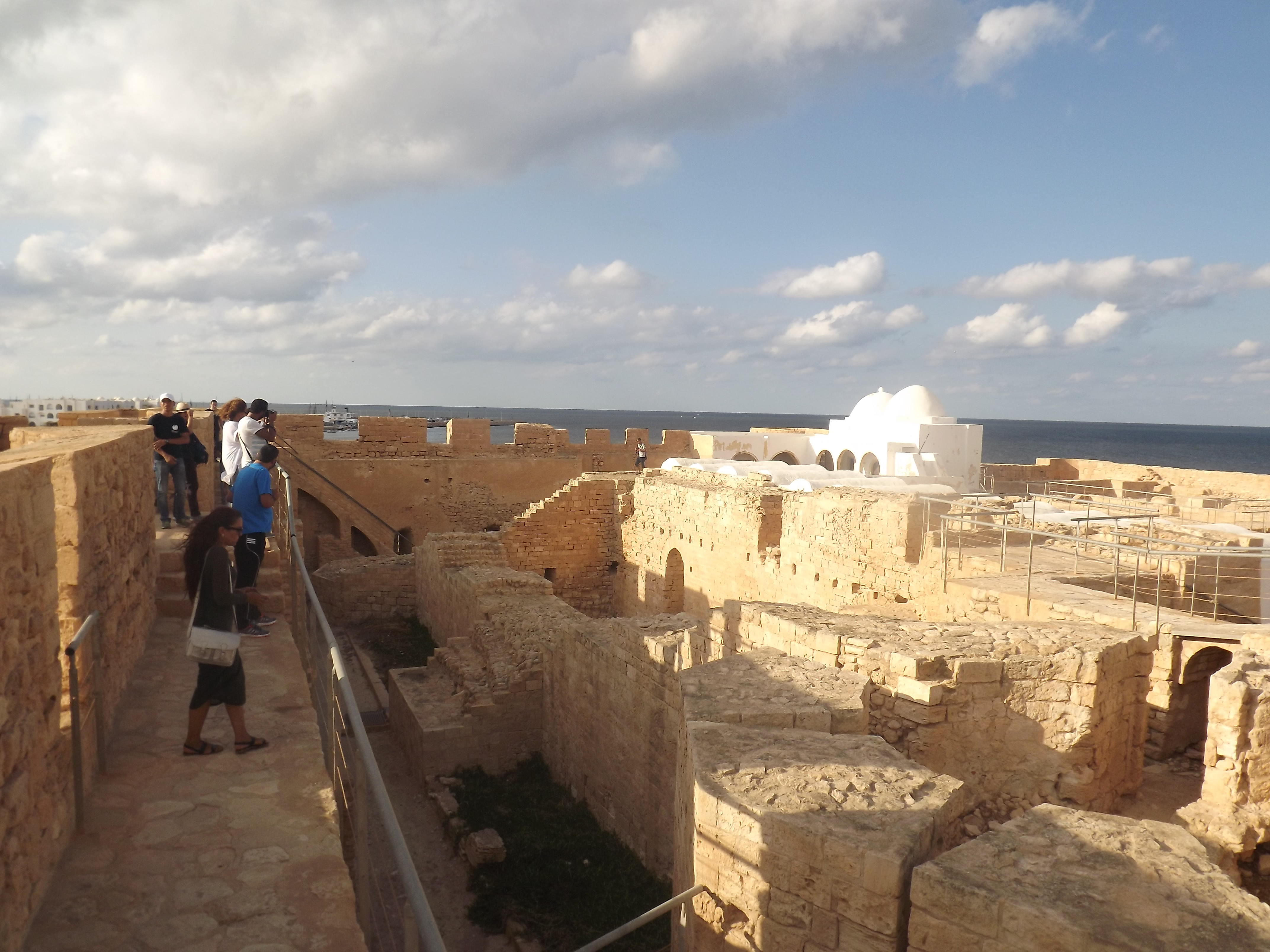 Kasba